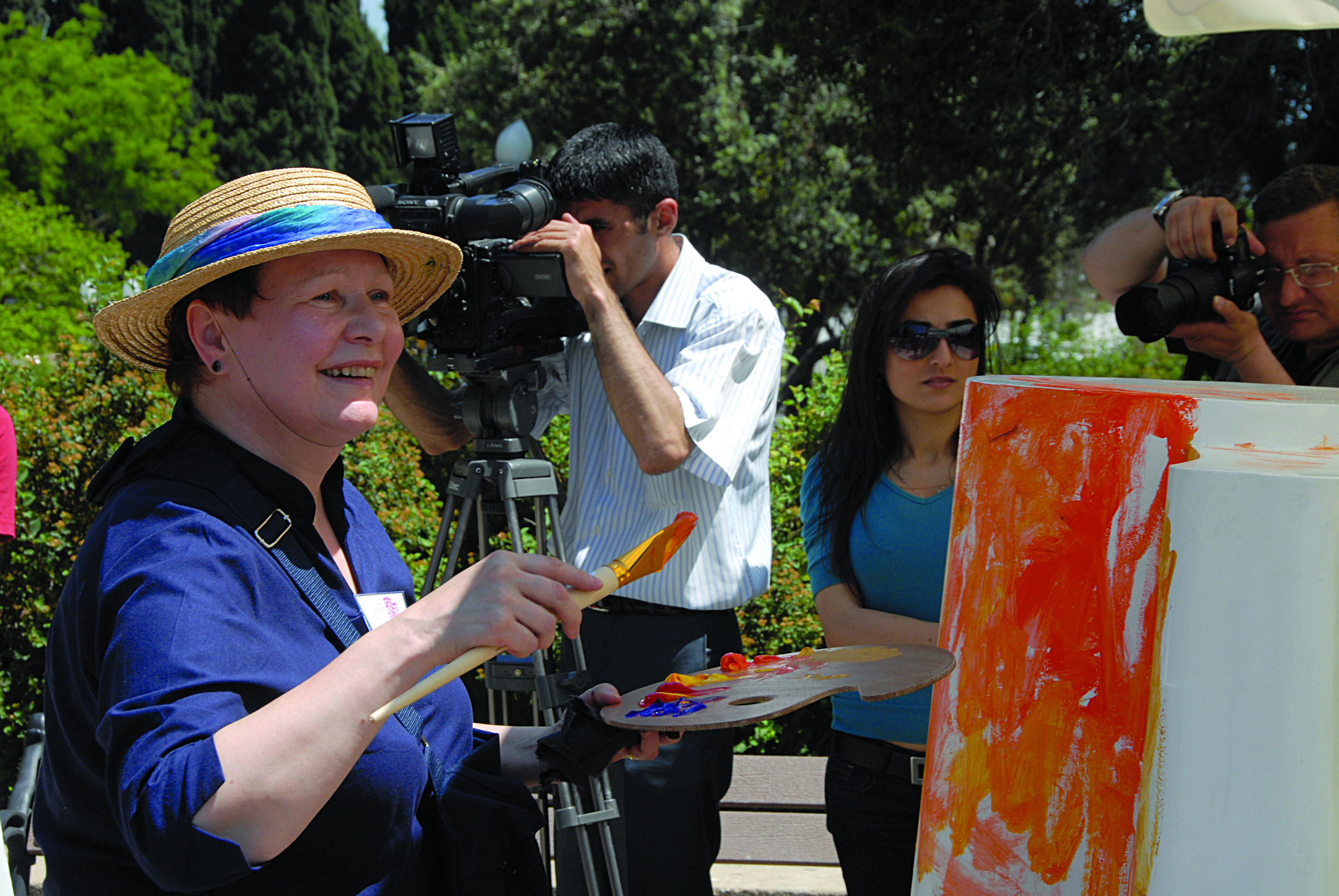 Qız qalası Beynəlxalq incəsənət festivalı